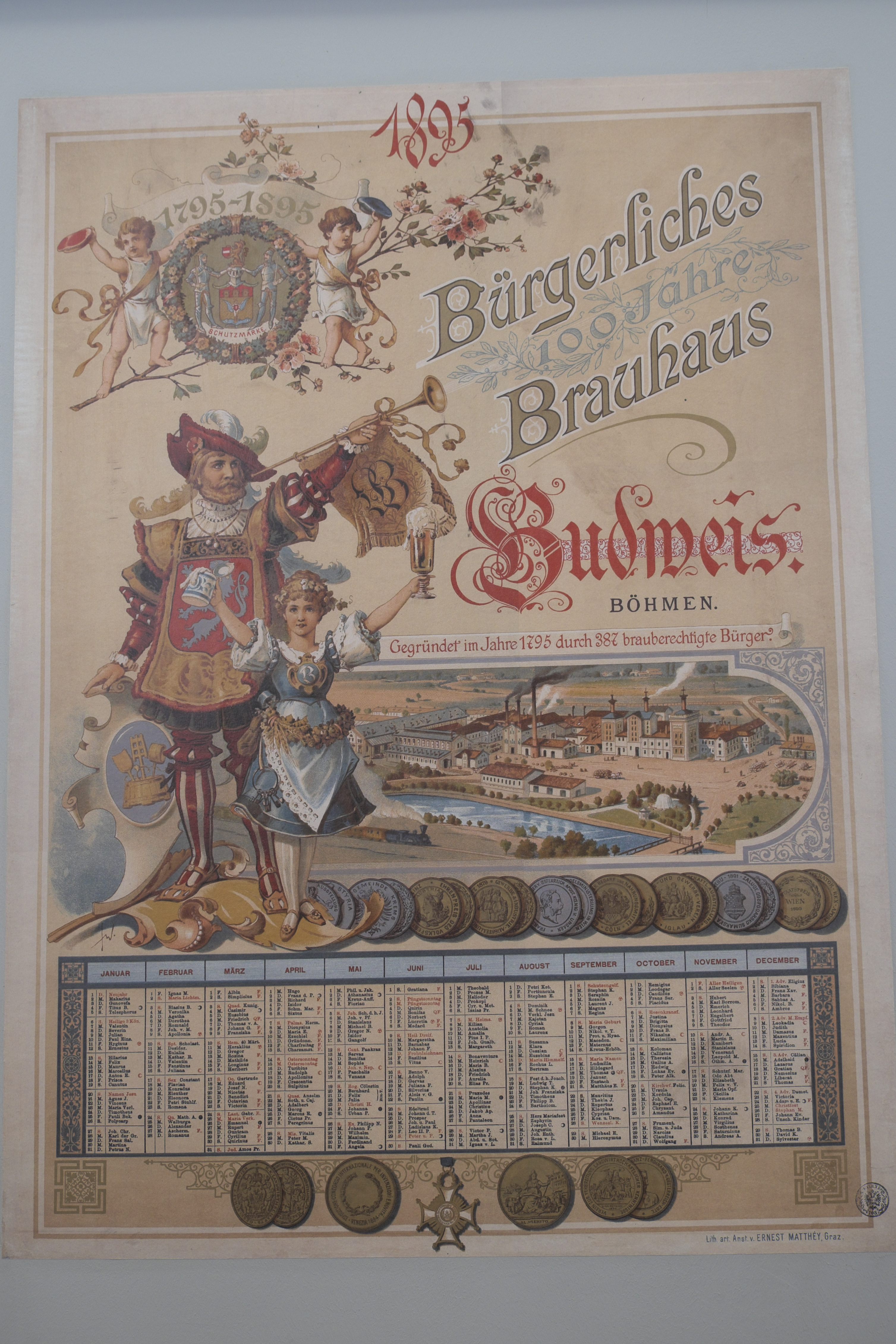 Südböhmisches Museum in Budweis (České Budějovice) in der Südböhmischen Region (Jihočeský kraj, Tschechien), Plakat der Budweiser Brauerei